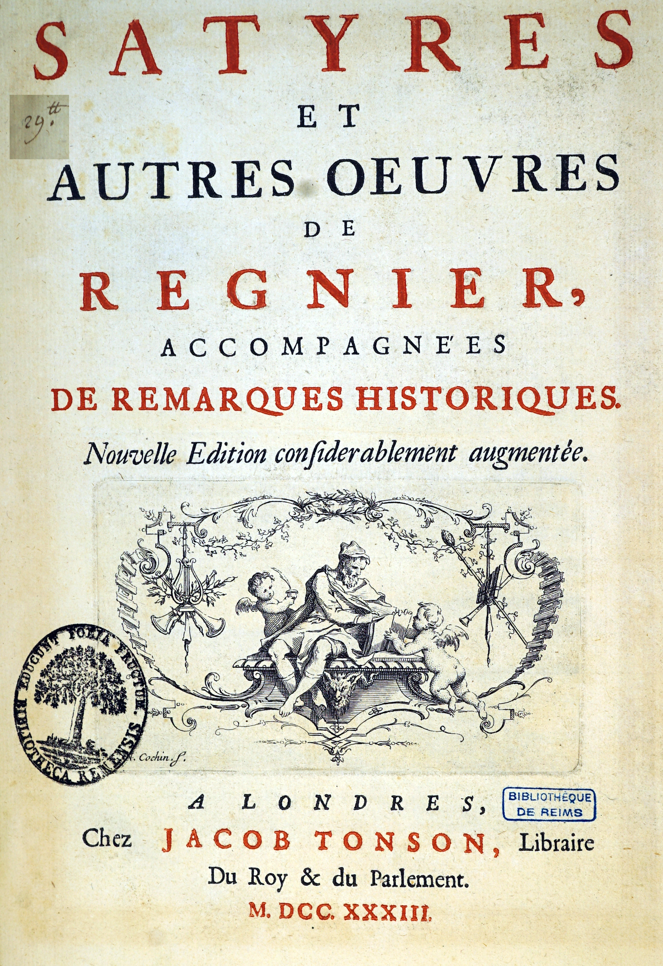 Satyres ... par M. Régnier.